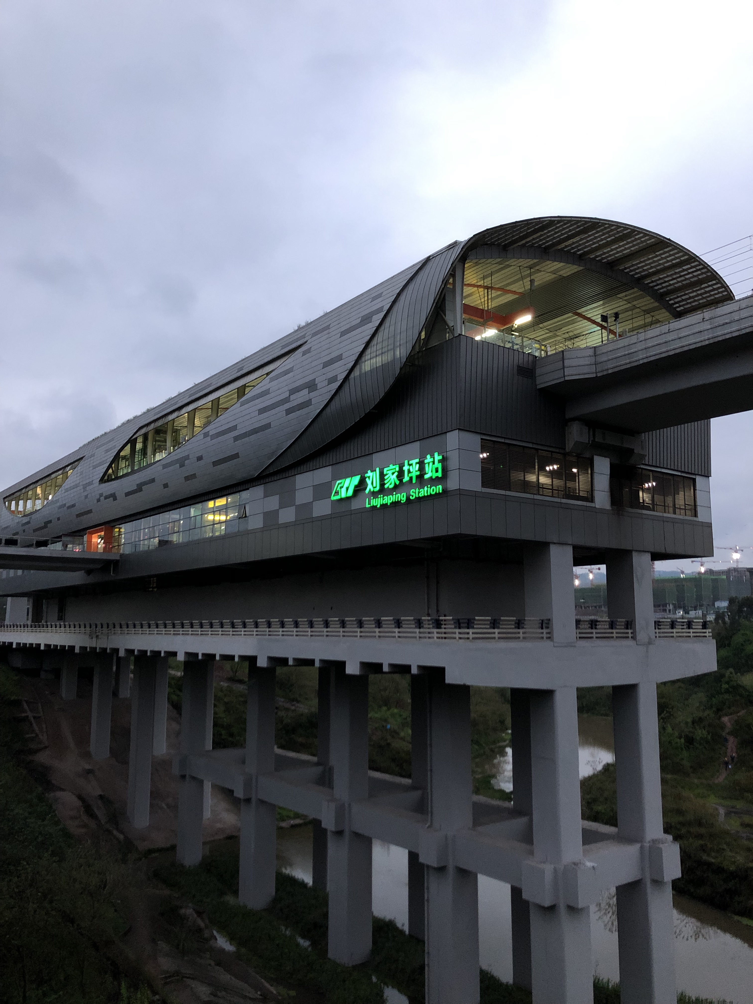 中文（中国大陆）: 6号线刘家坪站